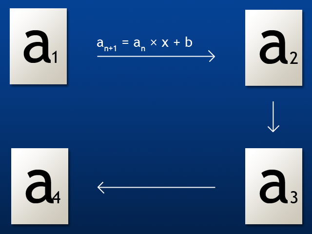 Une illustration pour l'article Série spectrale (mathématiques). Image créée sous Photoshop CS2.